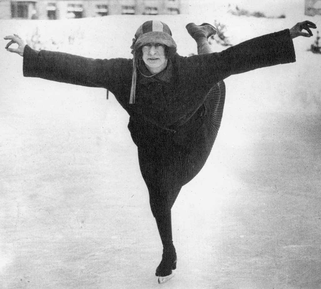 Sports d'hiver à Saint Moritz : Miss Ethel Muckelt, championne anglaise : [photographie de presse] / Agence Meurisse